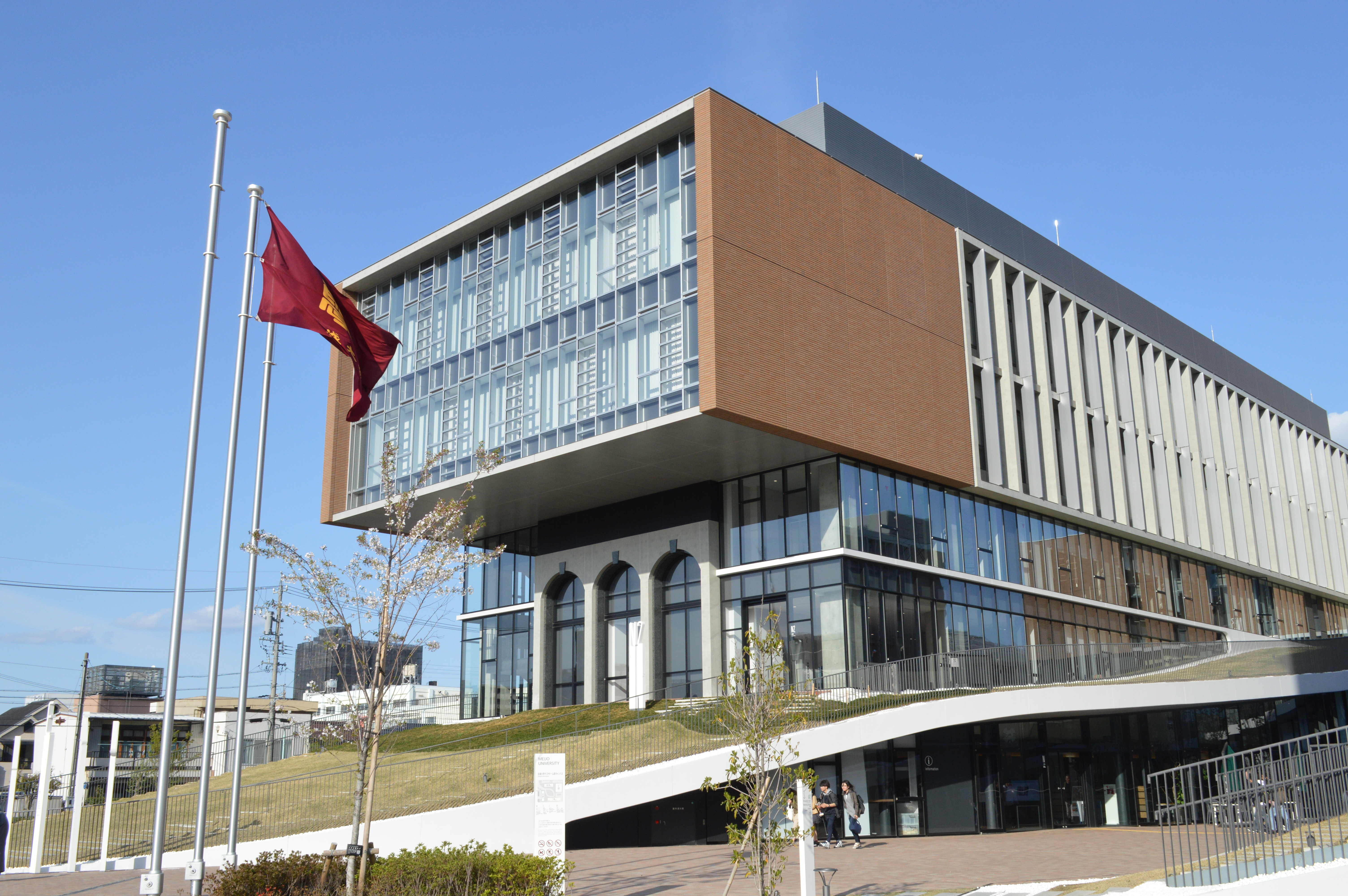 名古屋市東区の名城大学ナゴヤドーム前キャンパス。